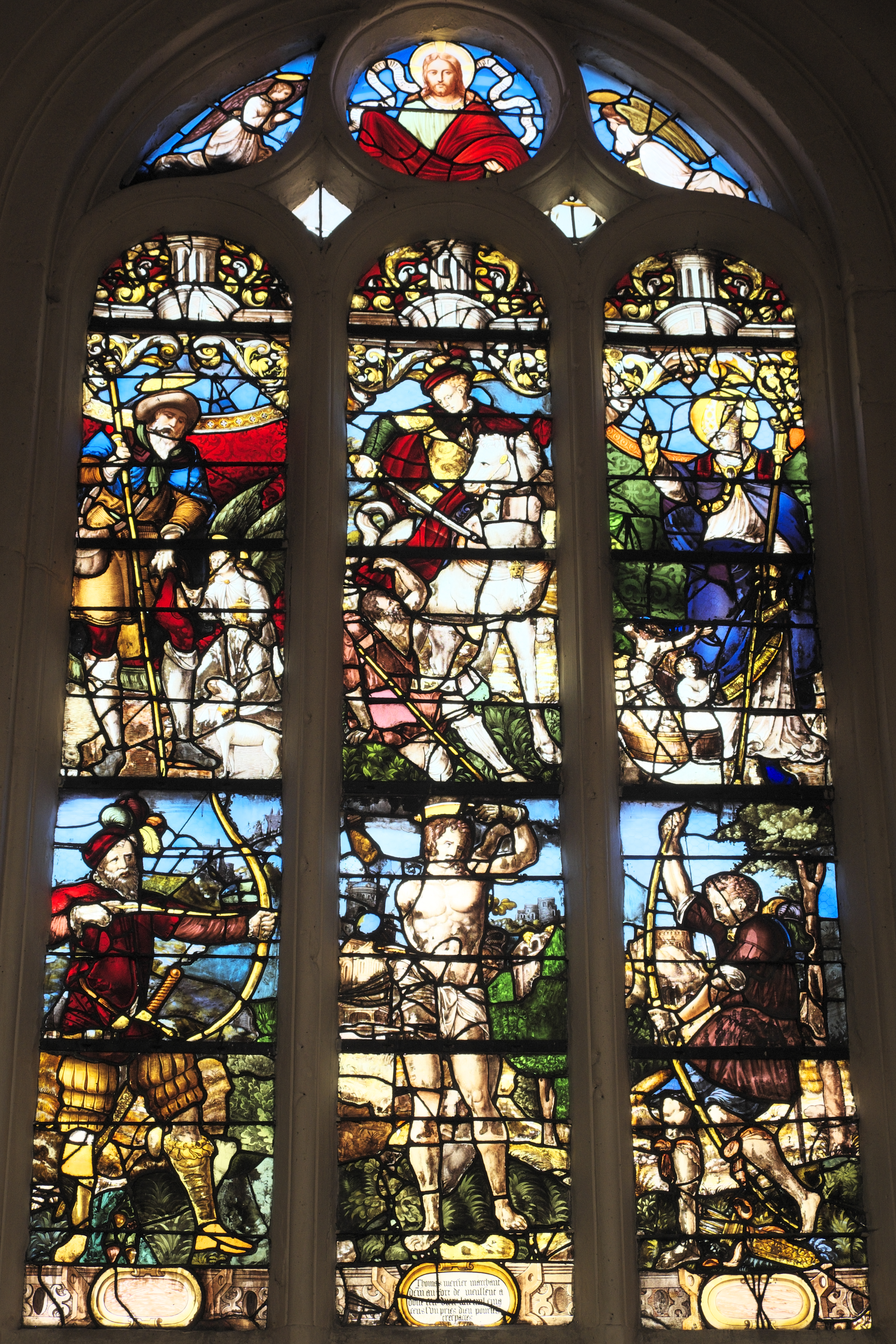 Katholische Pfarrkirche Saint-Martin in Triel-sur-Seine im Département Yvelines (Île-de-France/Frankreich), Bleiglasfenster (n° 7) aus dem Jahr 1557, gestiftet von Thomas Mercier; Darstellung: Heilige Rochus, Martin und Nikolaus (oben), Martyrium des heiligen Sebastian (unten)